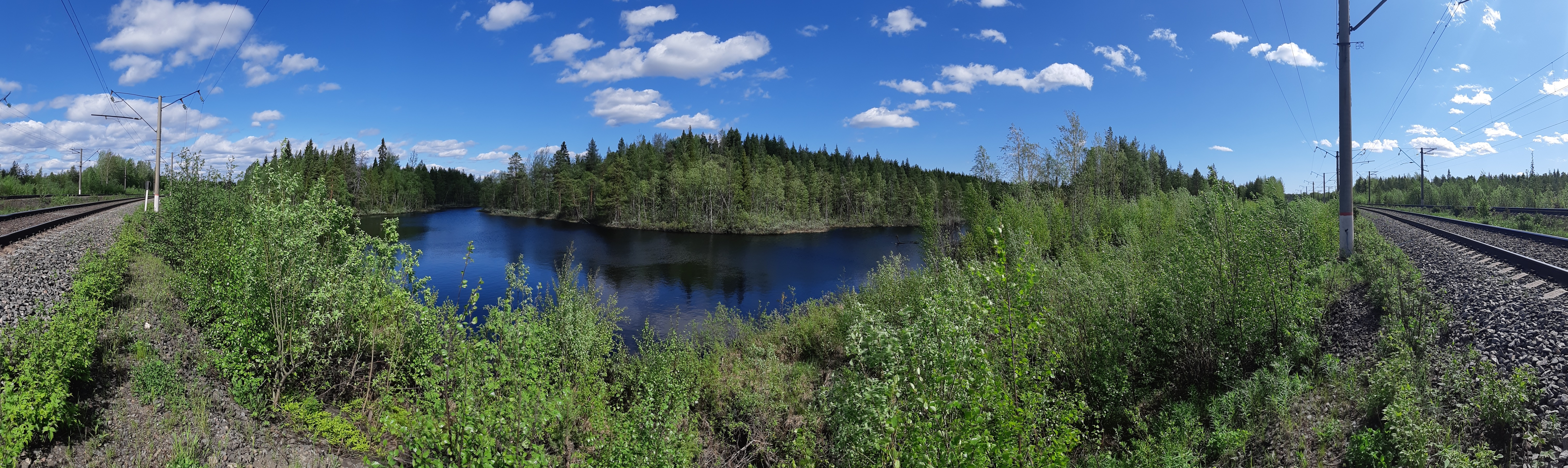 оз. Топорное